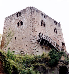 Burg Neuwindstein, Wohnturm von Süden